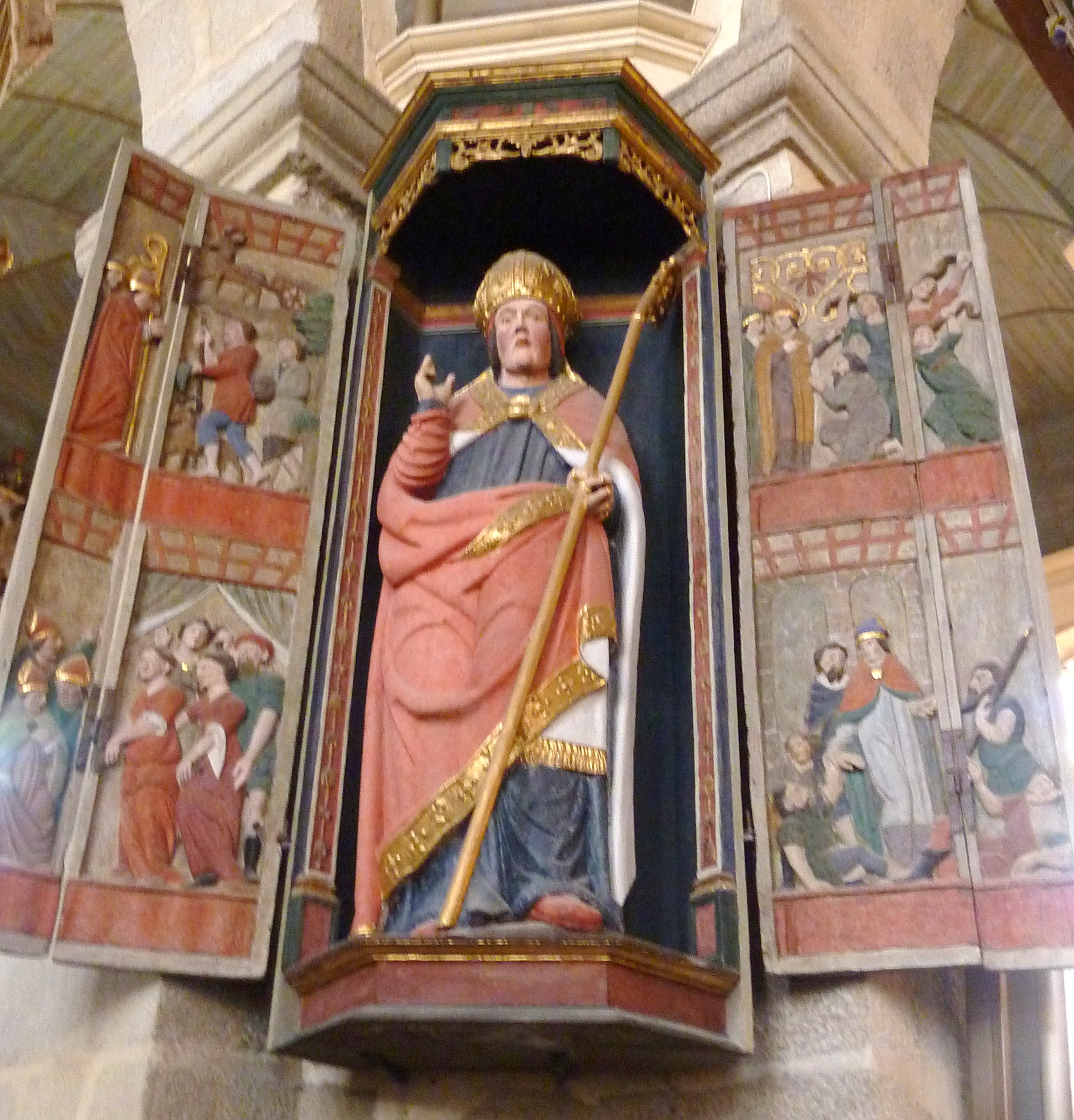 Saint-Thégonnec, église paroissiale Notre-Dame, tryptique de saint Thégonnec